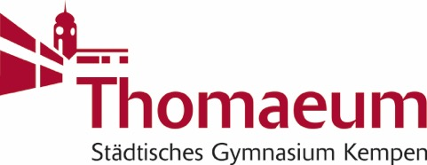 Logo des Gymnasiums Thomaeum in Kempen